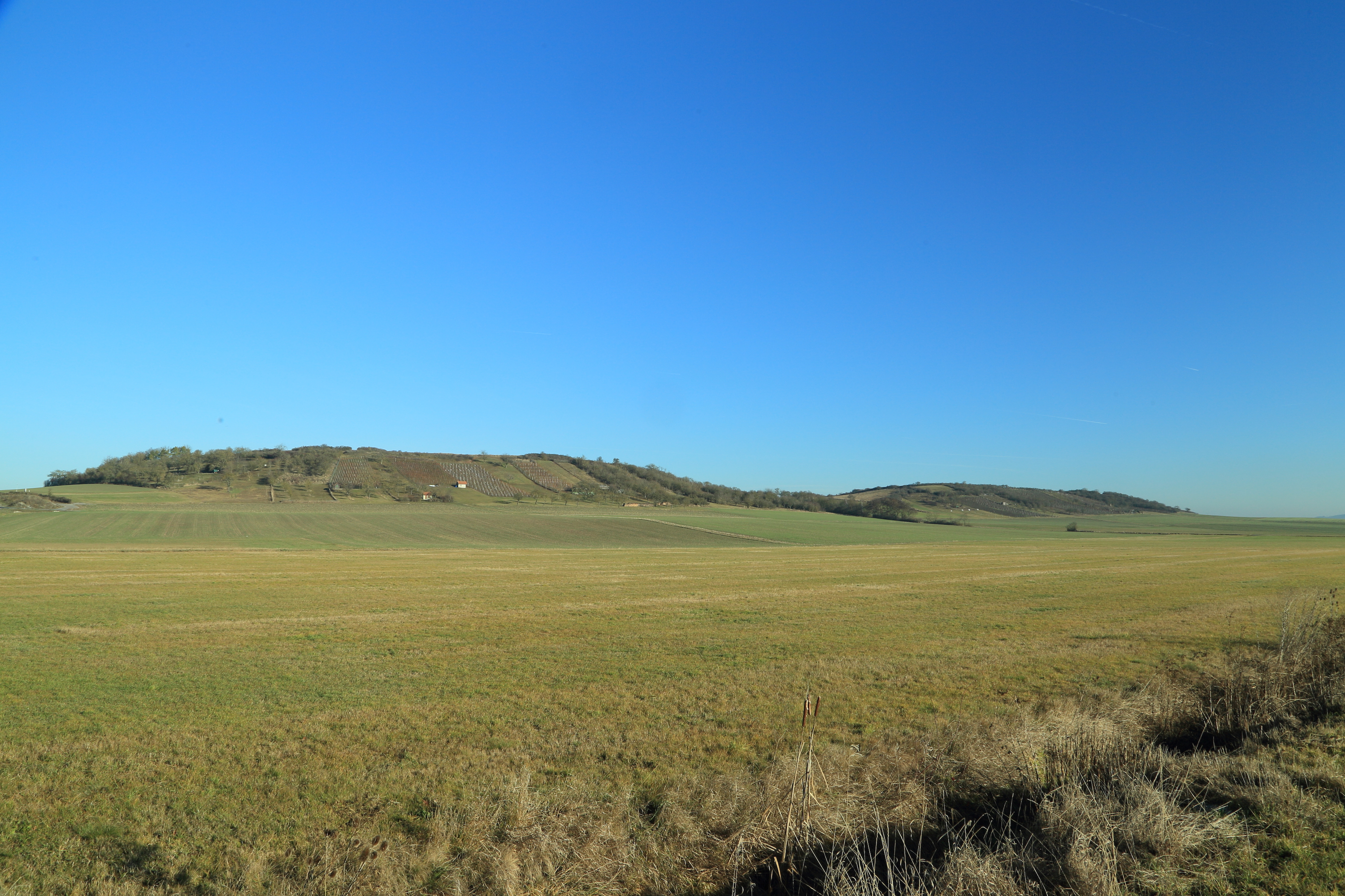 Zeugenberglandschaft ENE von Erkenbrechtshofen Geotop-Nummer: 575R010